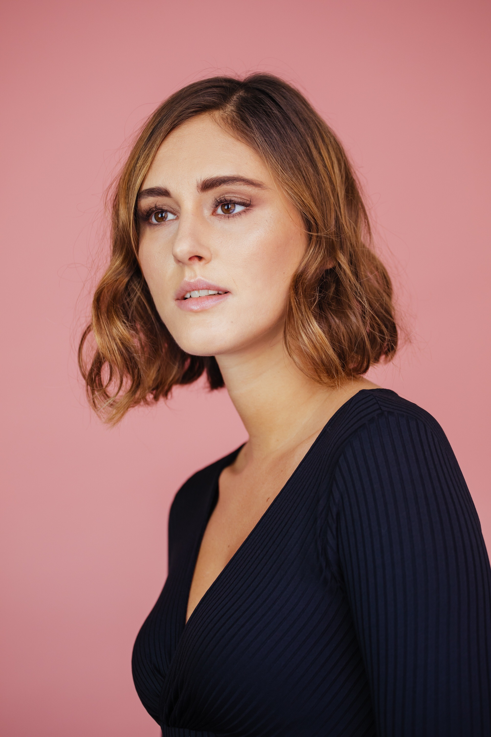 Zoe Tavarelli fotografata da Alessandro Cantarini